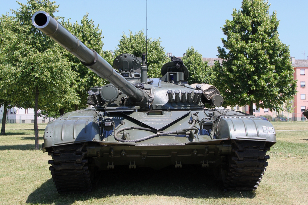 Tenk M-84